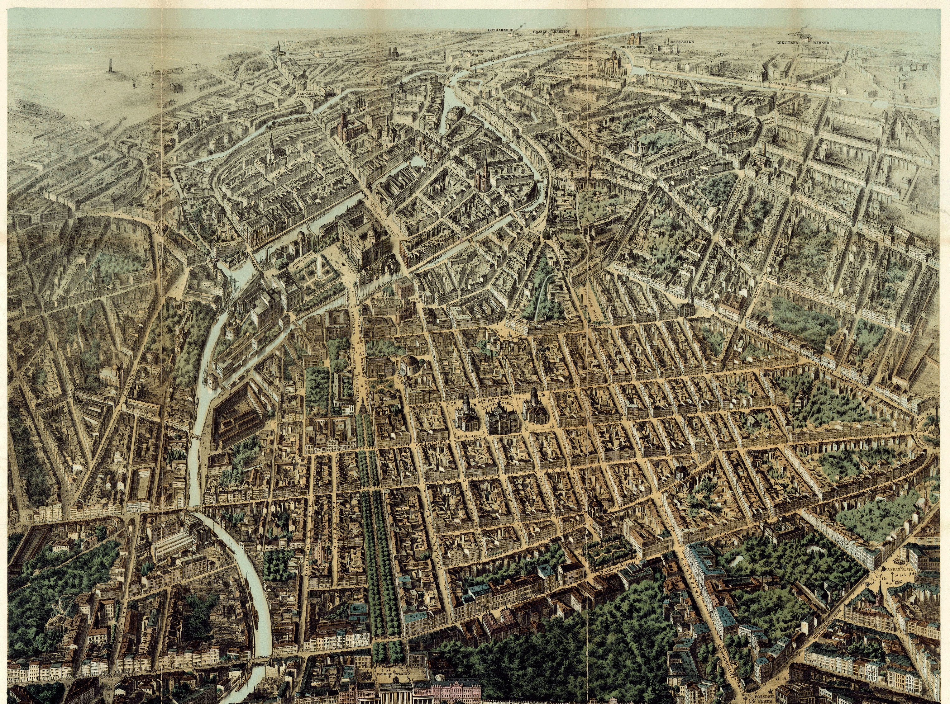 Ansicht von Berlin aus der Vogelperspective. Format: 65,0 x 50,0 cm (nur der Plan) Maßstab: ca 1:5.000 (Vogelschau) Orientierung: Ost Lithografie Kolorierte Lithografie des 1868 erstmals im Verlag Elwin Staude erschienen Plans. Die untere (westliche) Begrenzung des Plans wird gebildet durch die Achse Karlplatz, Pariser Platz und Potsdamer Platz. Rechts (südlich) ist der Belle-Alliance-Platz (Mehringplatz) noch halb abgebildet. In der Ferne sind der Ostbahnhof und der Görlitzer Bahnhof angedeutet.